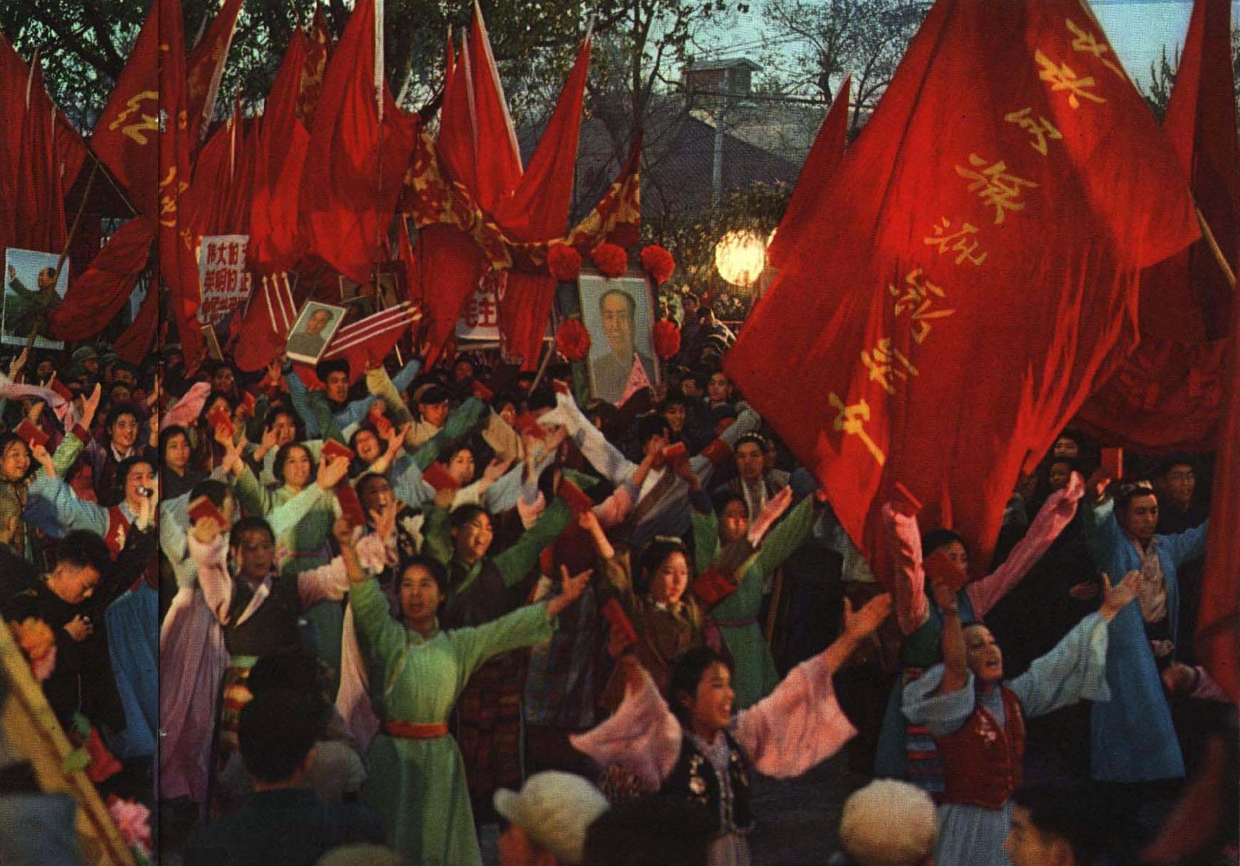 1967-07 1967年中央民族学院附中庆祝革委会成立